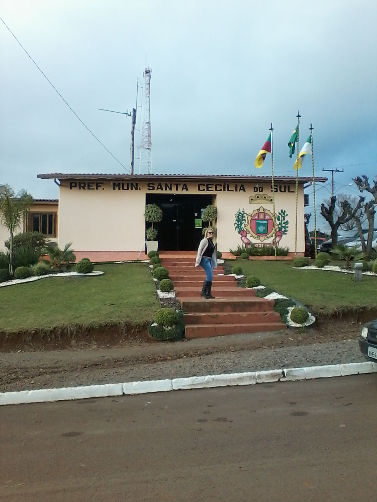 Prefeitura Municipal de Santa Cecília do Sul, 26 de maio de 2014.